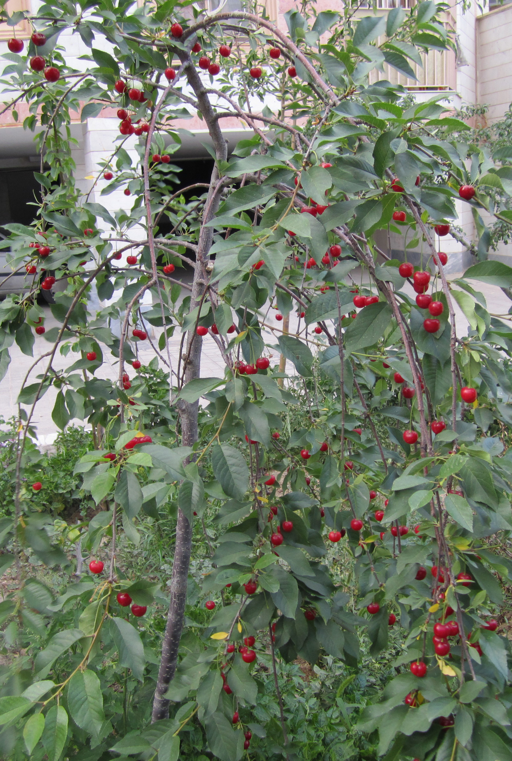 یک درخت کوچک آلبالو در کرج